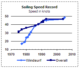 merryfrankster, own work